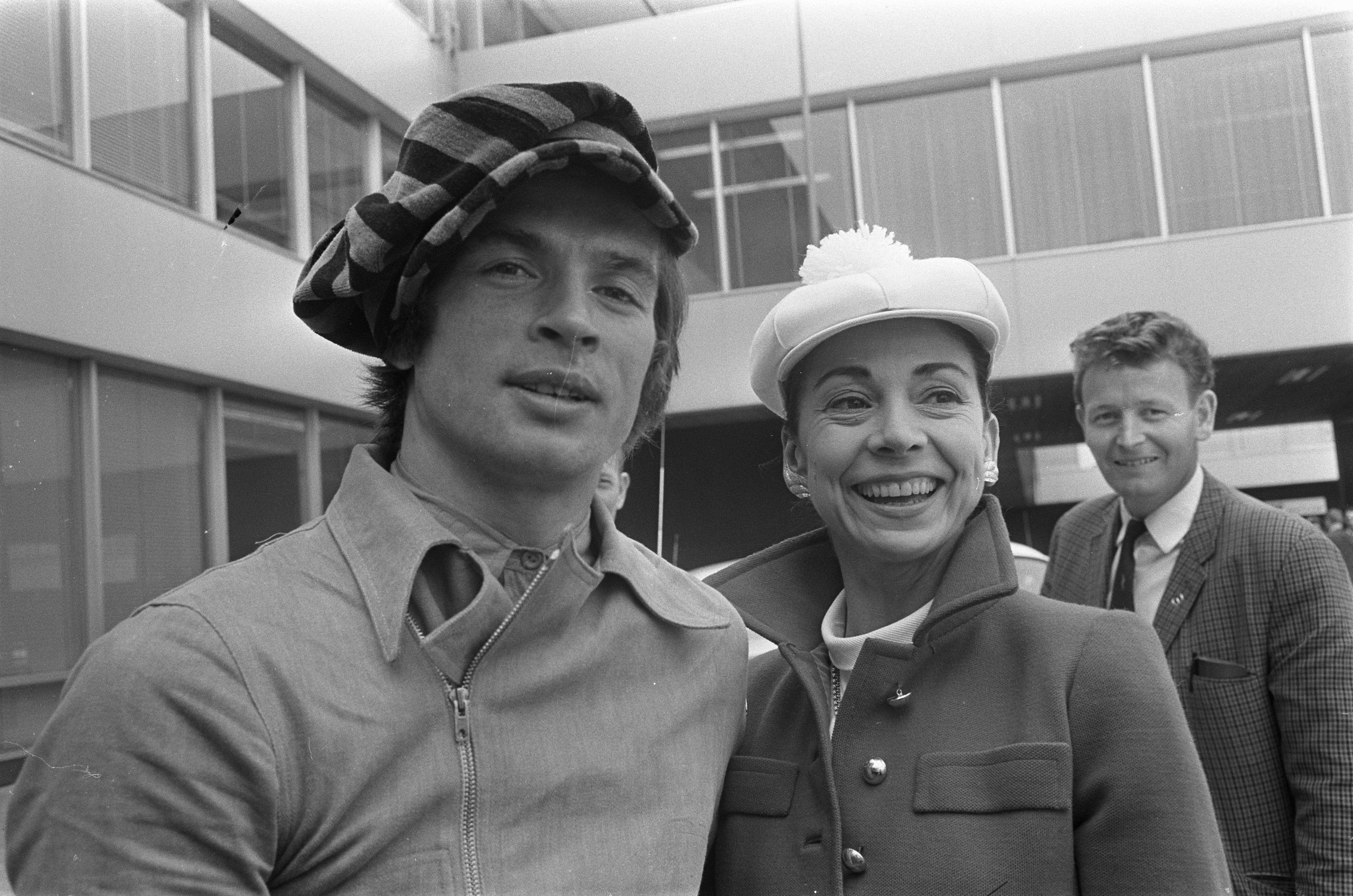 Collectie / Archief : Fotocollectie Anefo Reportage / Serie : [ onbekend ] Beschrijving : Aankomst Margot Fonteyn en Rudolf Nurejev op Schiphol Margot Fonteyn en Rudolf Nurejev Datum : 10 juli 1968 Locatie : Noord-Holland, Schiphol Trefwoorden : aankomsten Persoonsnaam : Rudolf Nurejev Fotograaf : Koch, Eric / Anefo Auteursrechthebbende : Nationaal Archief Materiaalsoort : Negatief (zwart/wit) Nummer archiefinventaris : bekijk toegang 2.24.01.05 Bestanddeelnummer : 921-5008